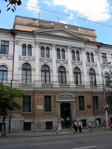 Cluj-Napoca, Liceul Unitarian "János Zsigmond" (Bulev. 21 Decembrie 1989 nr.9)